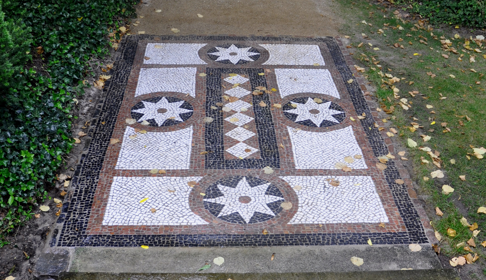 Kleinsteinmosaikpflster im Pleasureground Klein-Glienicke